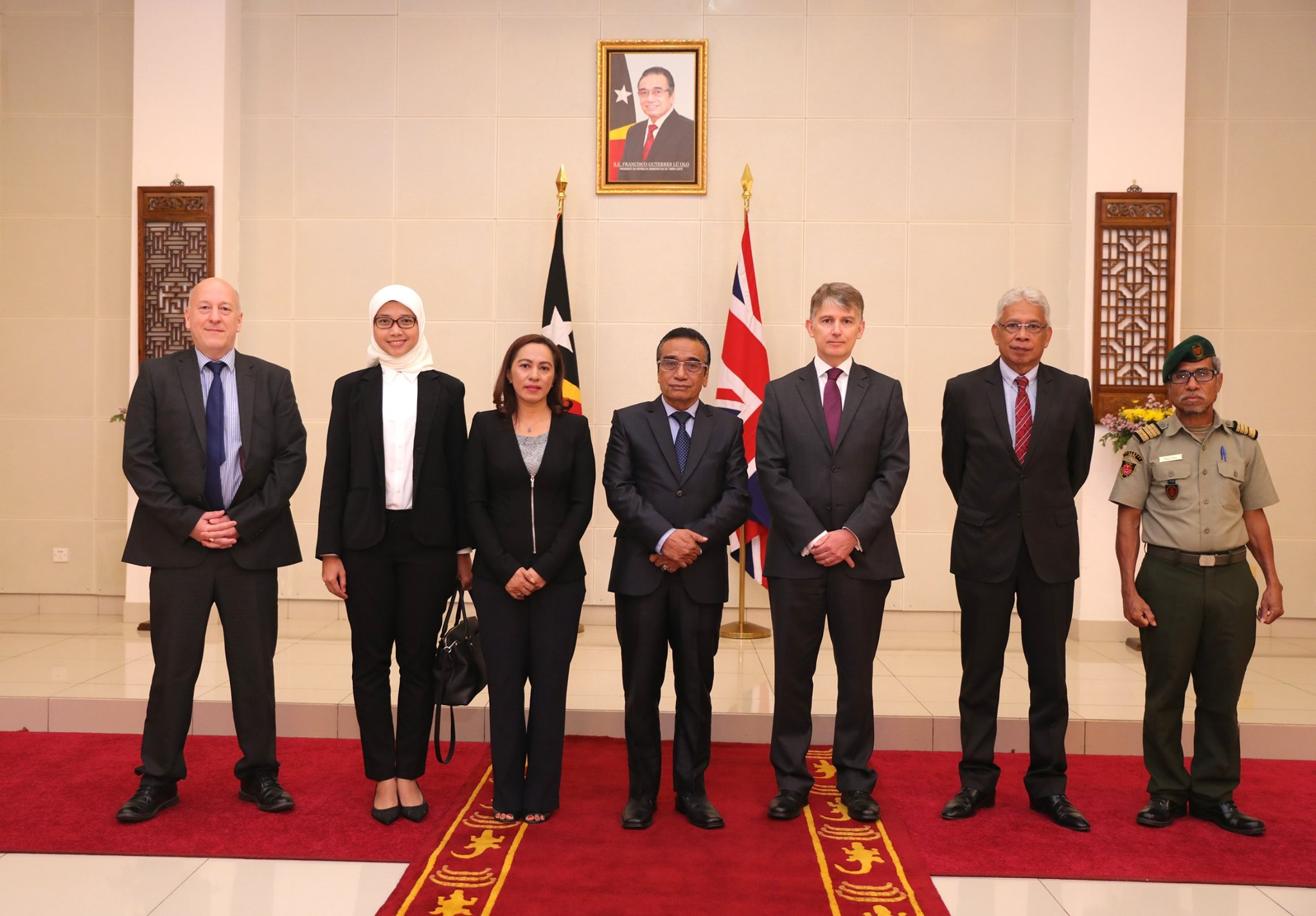 Präsident Francisco Guterres nimmt die Akkreditierung der neuen Botschafter in Osttimor entgegen: Finnland: Jari Sinkari Vereinigtes Königreich: Owen John Jenkins Polen: Beata Stoczynski Tetun: Prezidente Repúblika Francisco Guterres Lú Olo, ohin, simu karta kredensiál husi Embaixadór Finlandia, Jari Sinkari, Embaixadór Reinu Unidu, Owen John Jenkins, no Embaixadora Polónia, Beata Stoczynski atu hametin liután kooperasaun no amizade ho Timor-Leste.